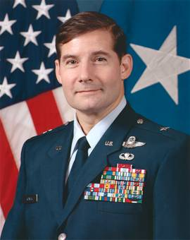 Portraitfoto von Major General Frank J. Kisner, USAF.